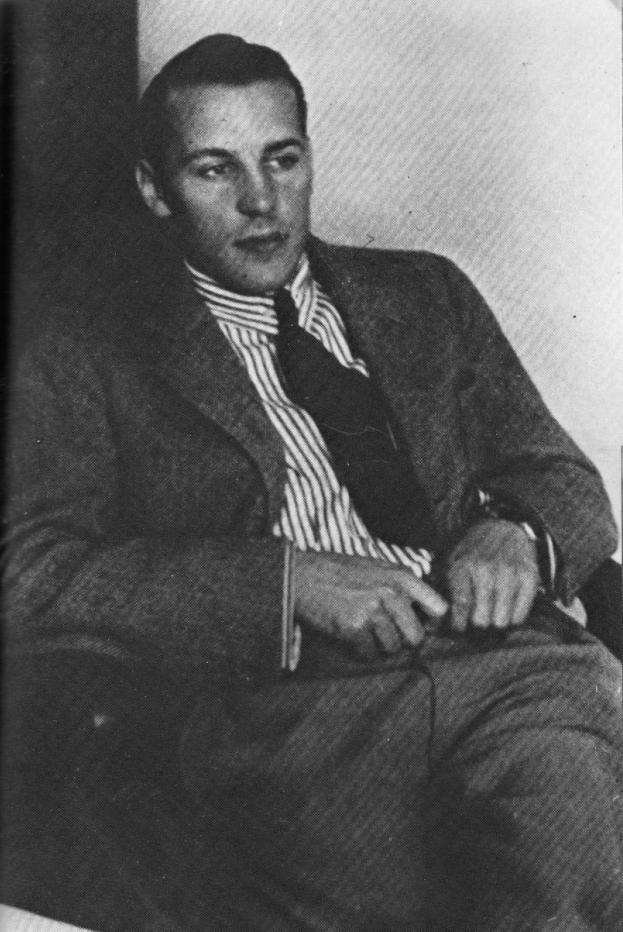 Suomalainen elokuvaohjaaja Nyrki Tapiovaara (1911-1940) vuonna 1938.